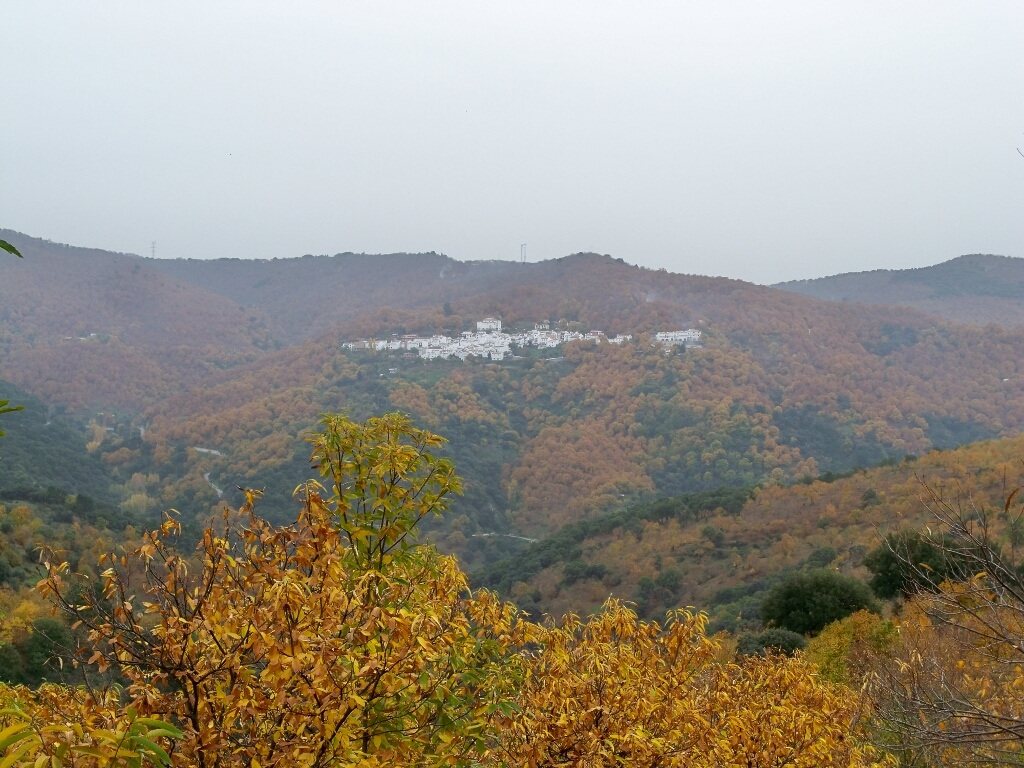 Pujerra, desde el sendero que va de Cartajima a Júzcar (PR-A 224), Serranía de Ronda, Málaga, España. Paisajes de encinas y castaños.